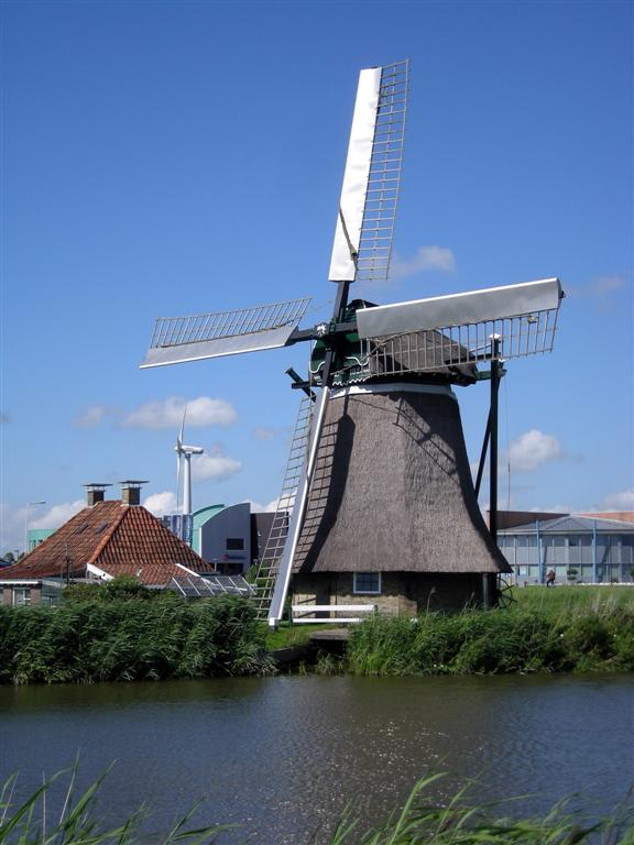 Tadema's molen bij Bolsward